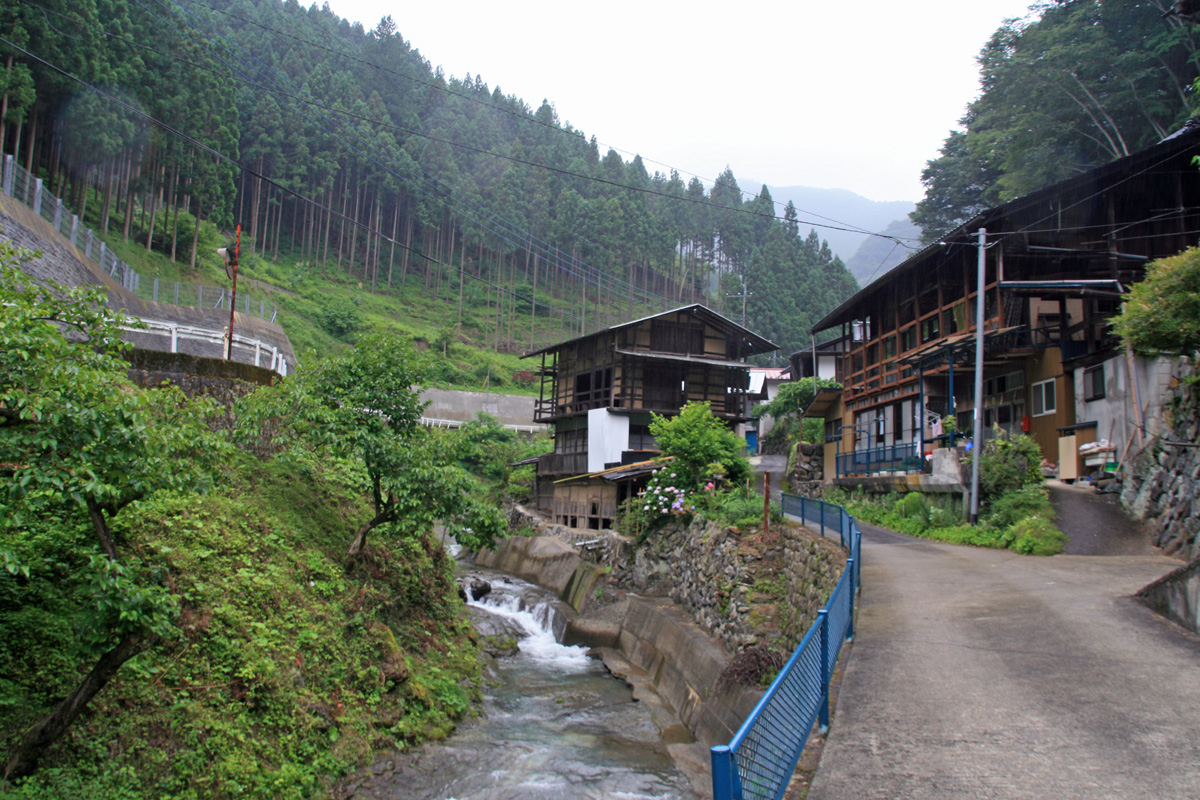 Taguchi, Saku, Nagano Prefecture 384-0412, Japan